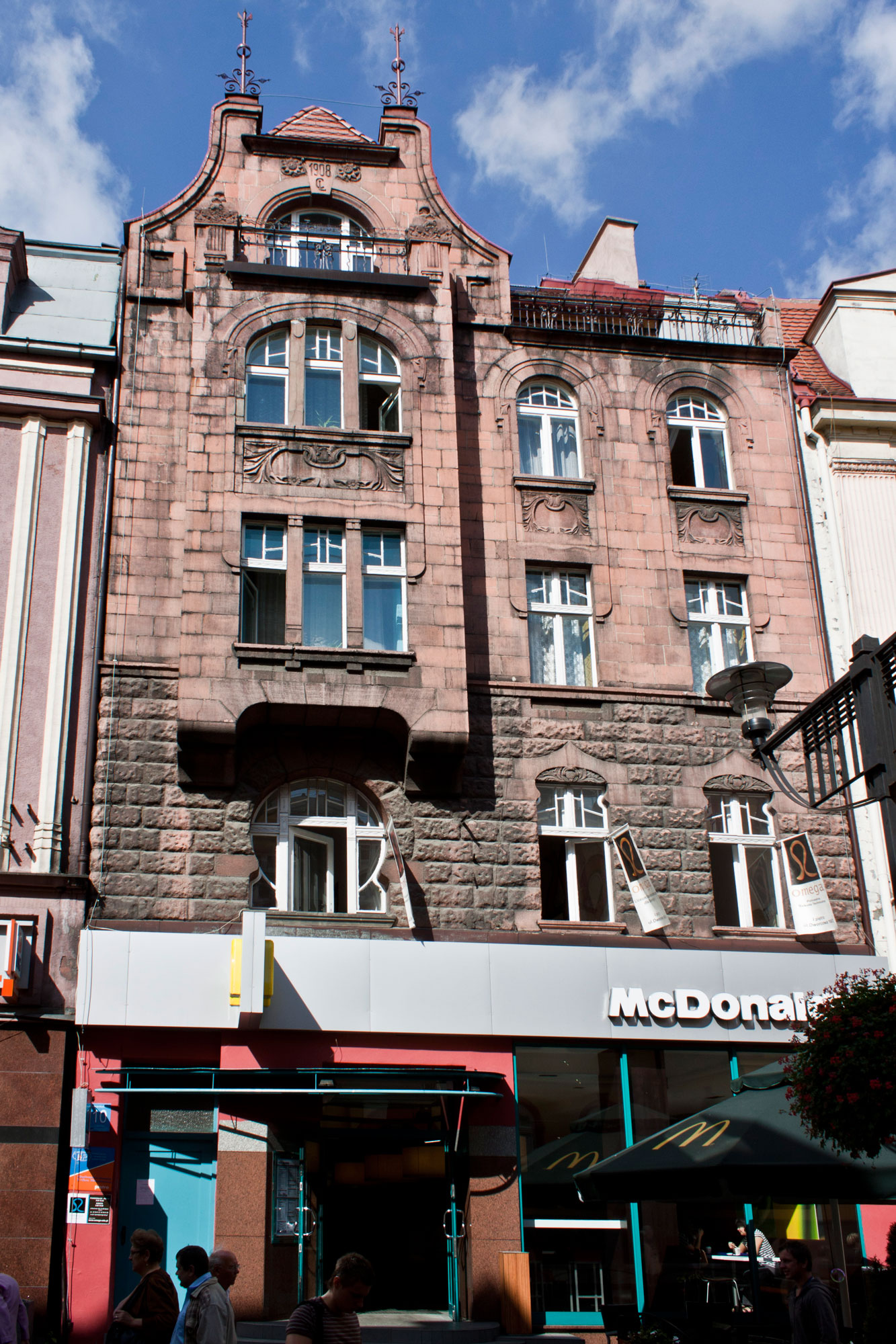 Kamienica z 1886 r. ul. Dworcowa 10. Bytom